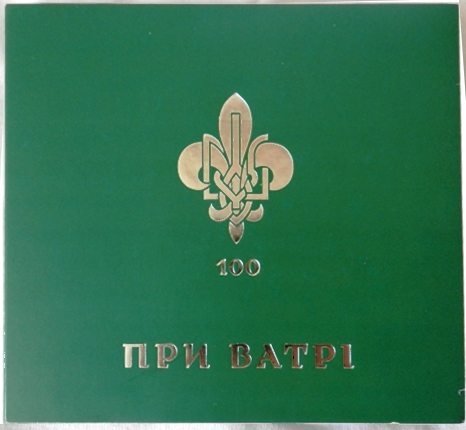 Збірка пластових пісень. Видана до століття оргназіації Пласт